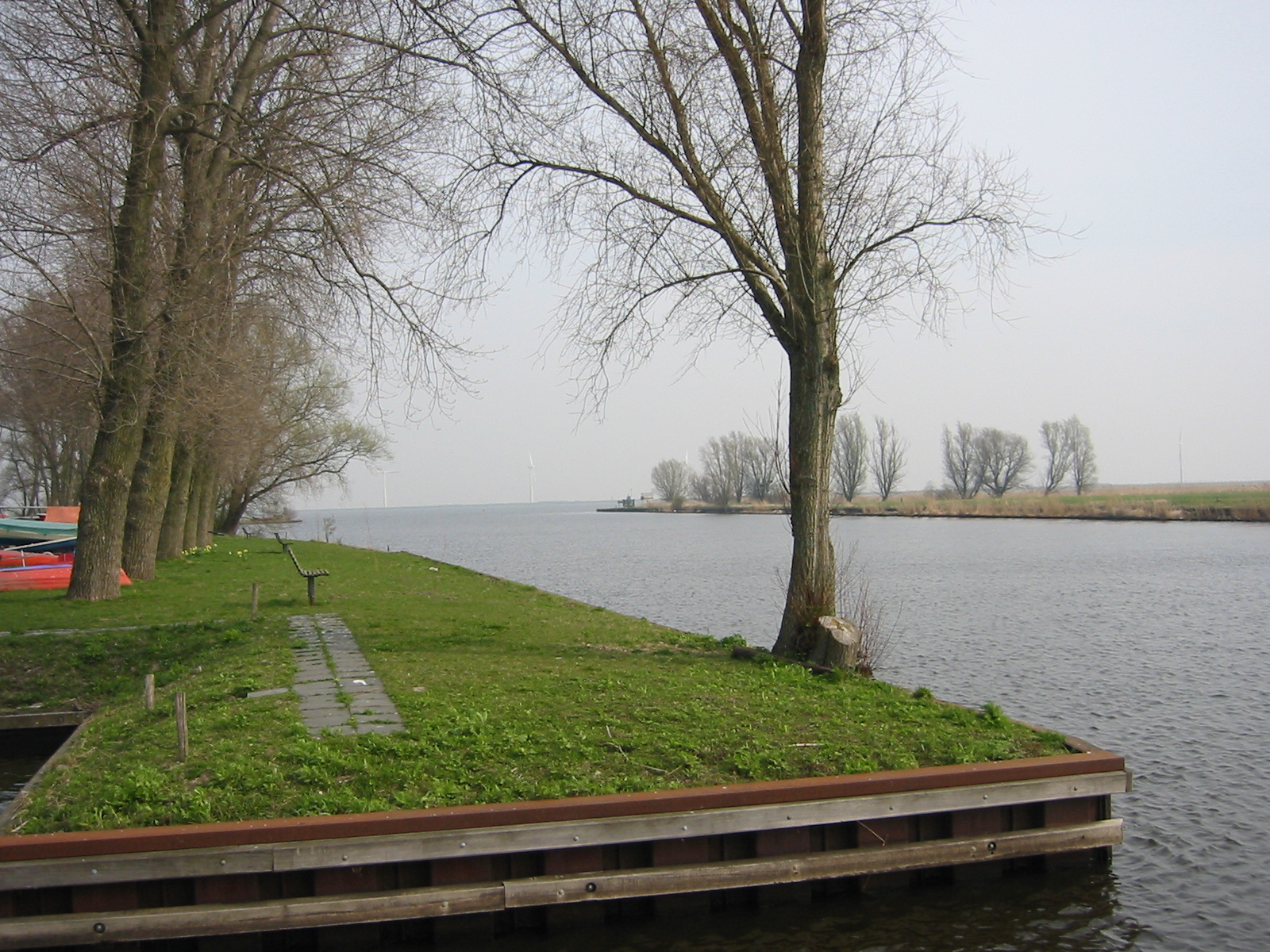 Monding Eem